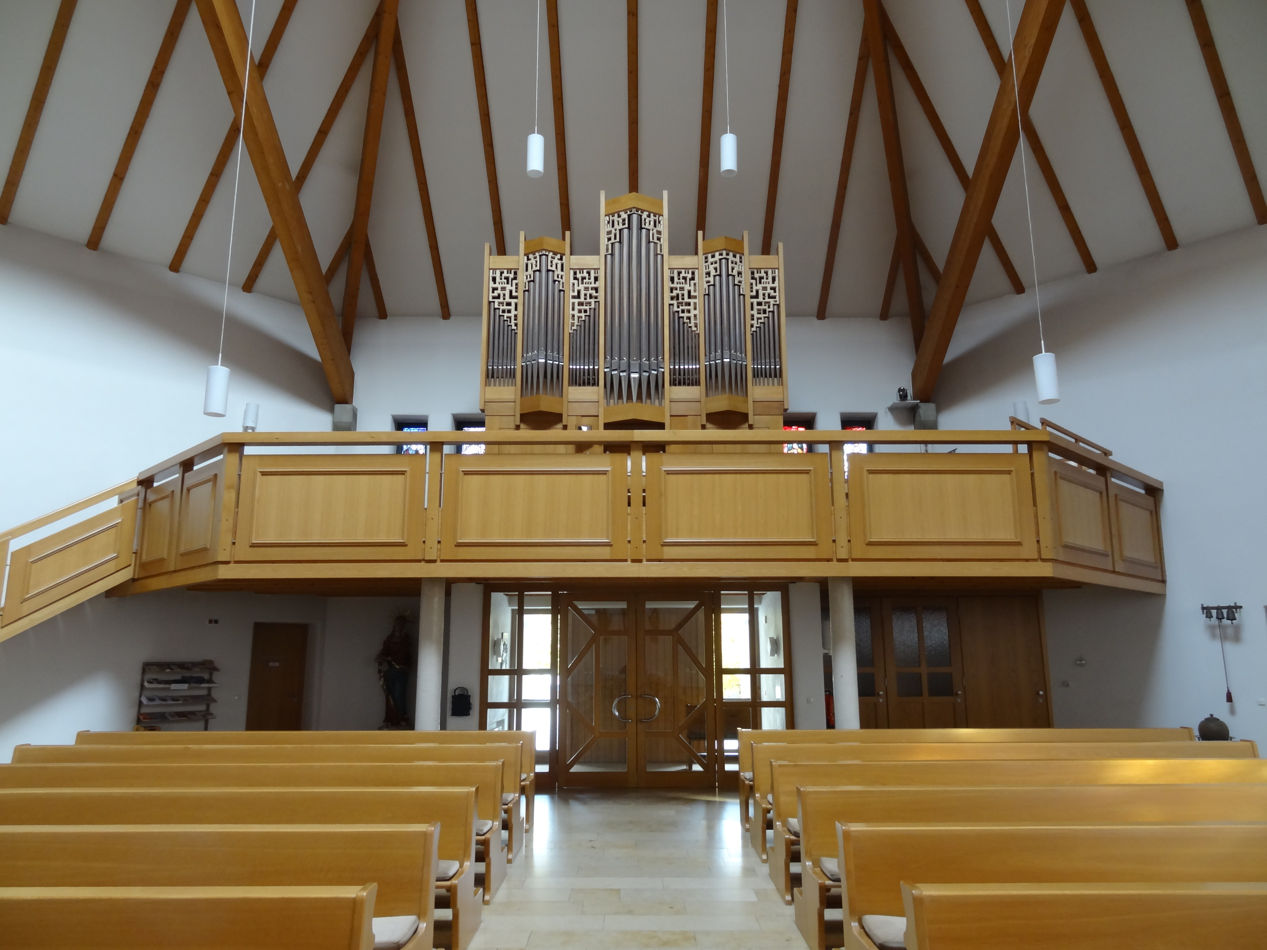 Gegenblick zum Portal und zur Empore in der Pfarrkirche St. Johannes in Piflas (Markt Ergolding, Landkreis Landshut, Bayern)